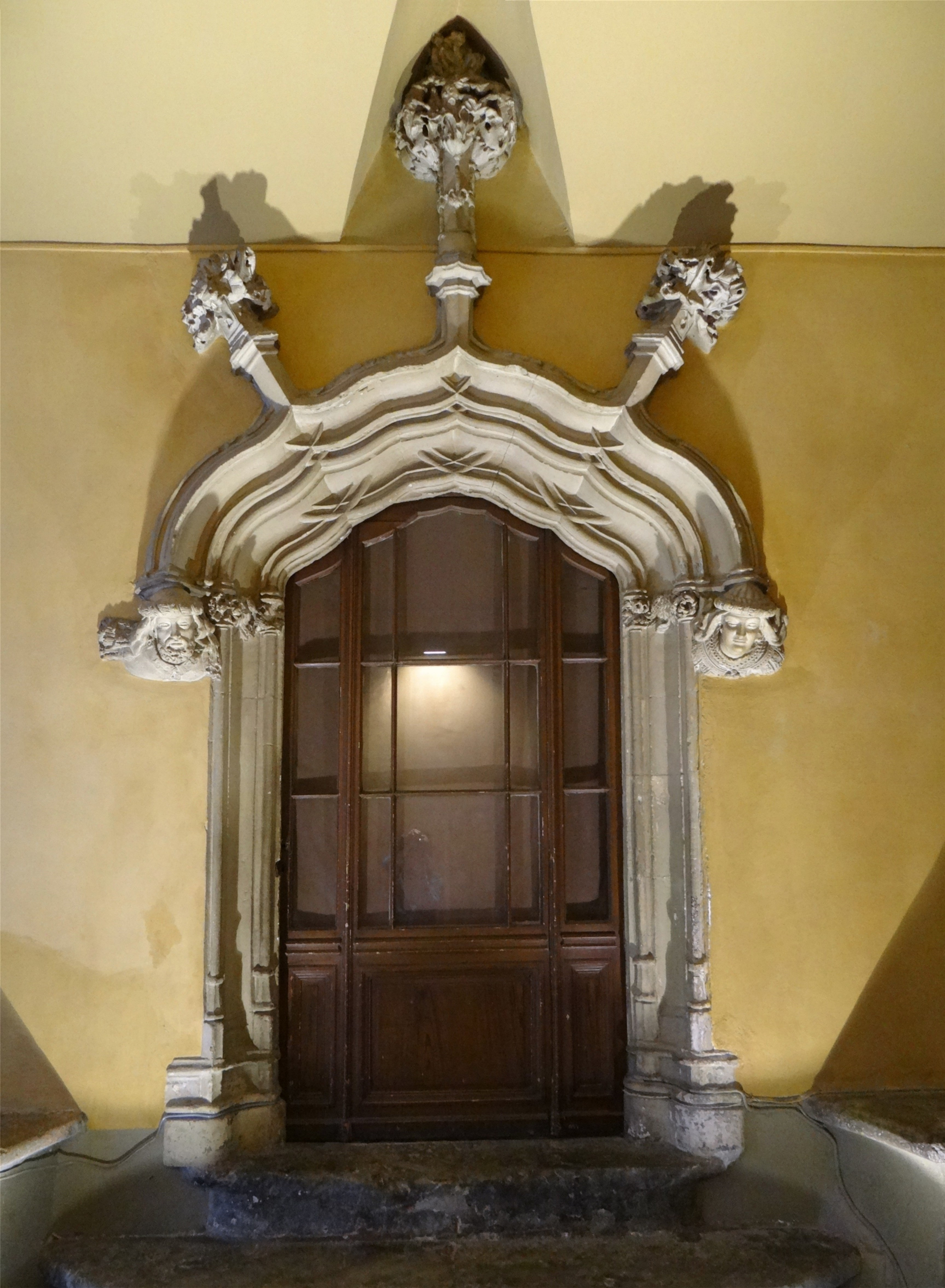 Porte dans le hall d'entrée, Casa Xanxo, Perpignan, Pyrénées-Orientales, France.